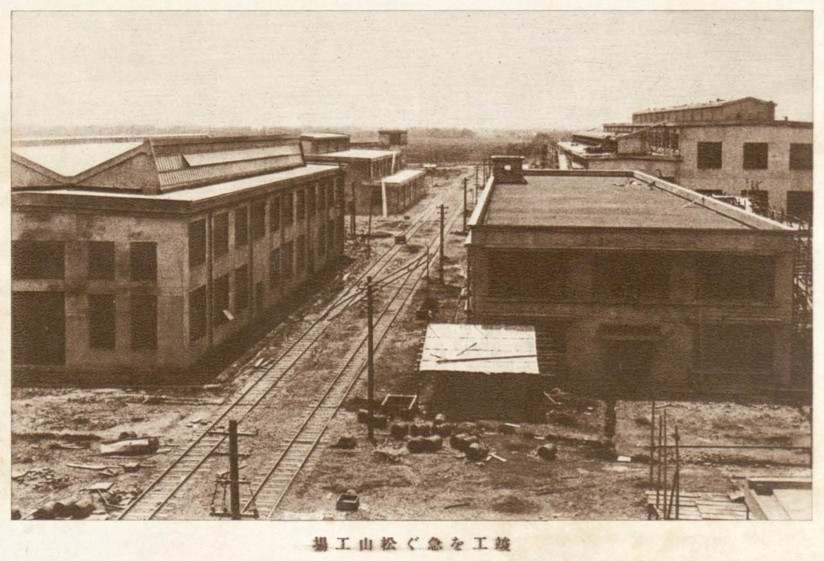 竣工を急ぐ松山工場